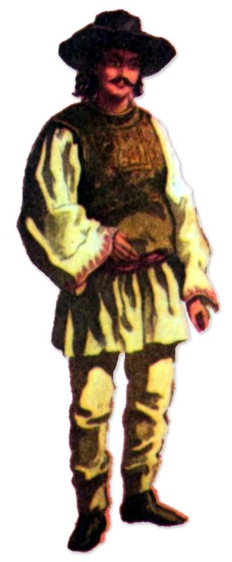 Romanians